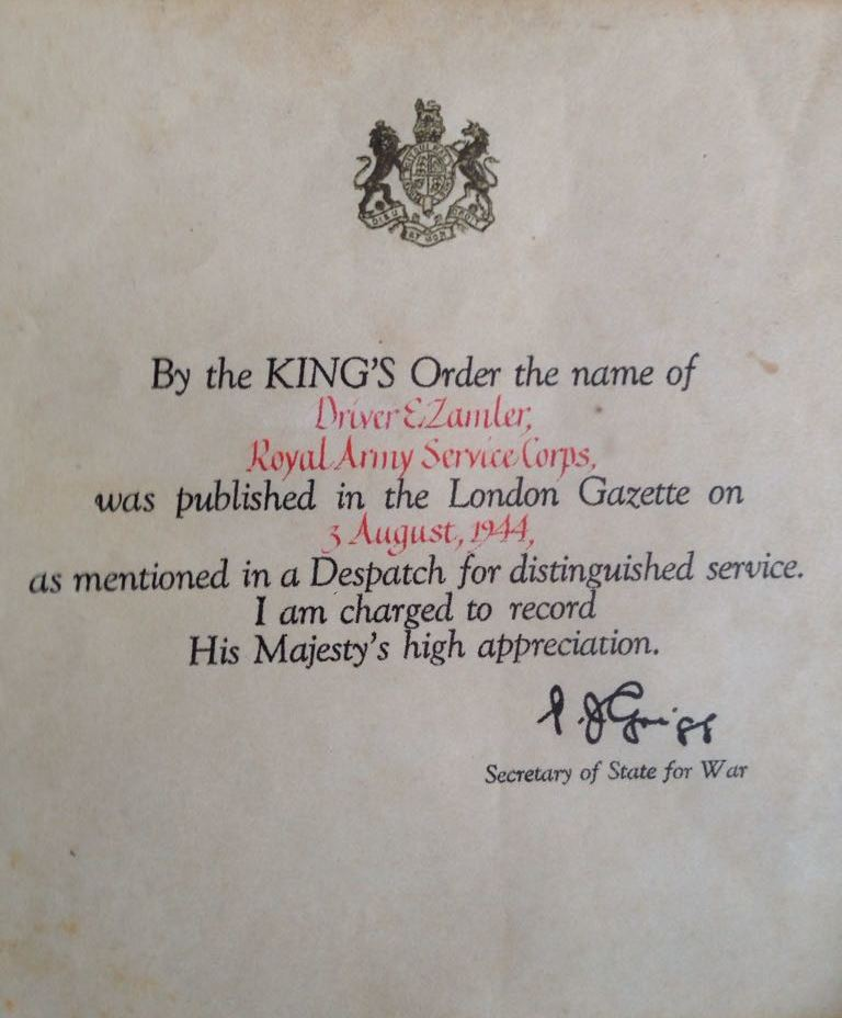 תעודת ההצטיינות שקיבל אליעזר זמלר ממשרד המלחמה הבריטי